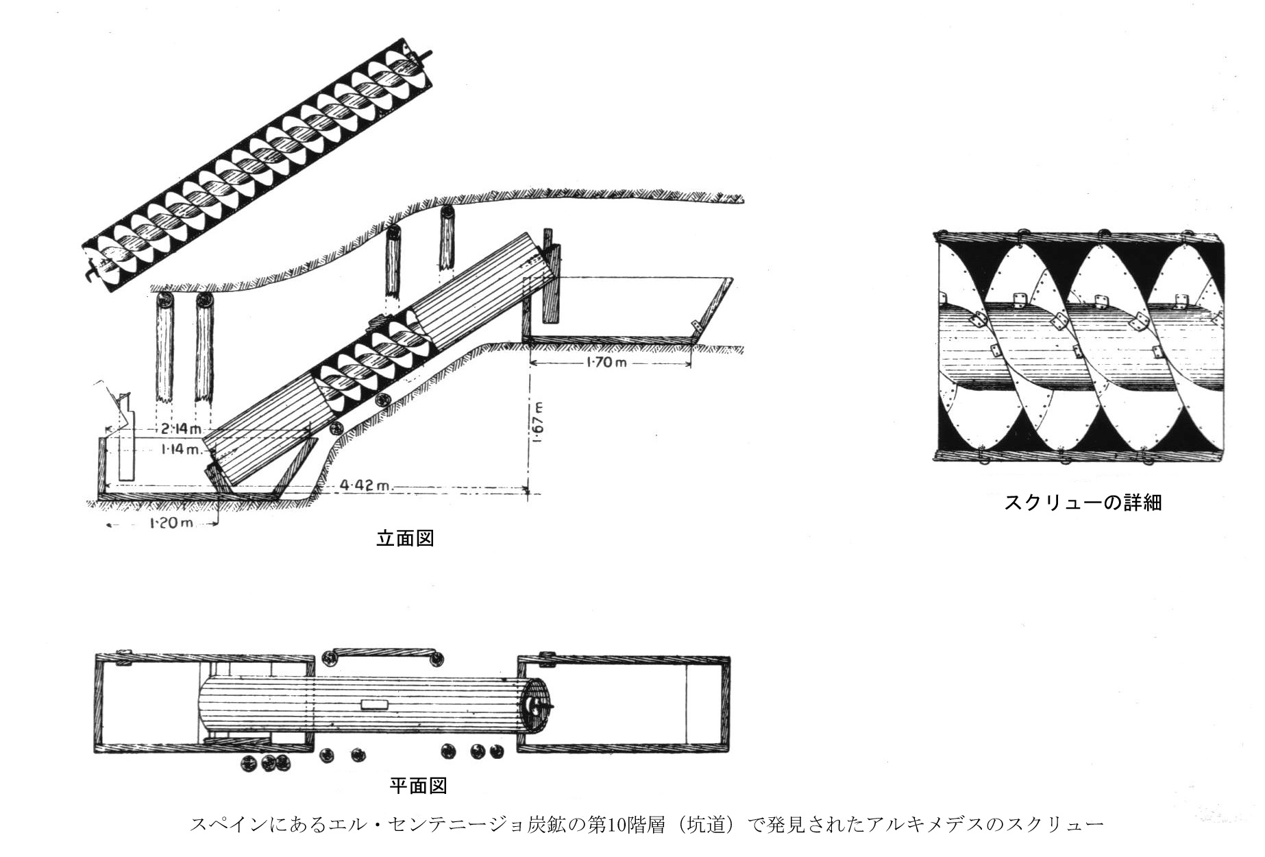 en: Archimedes' screw(13:08, 1 May 2018)に掲載されていたArchscrew.jpgの説明文を日本語に翻訳して掲載